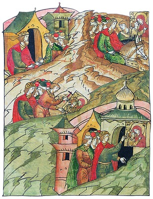 Блгв. кн. Андрей Боголюбский увозит Владимирскую икону из Вышгорода. Миниатюра из Лицевого летописного свода. Лаптевский том. 70-е гг. XVI в. (РНБ F. IV. 233. Л. 100 об.).